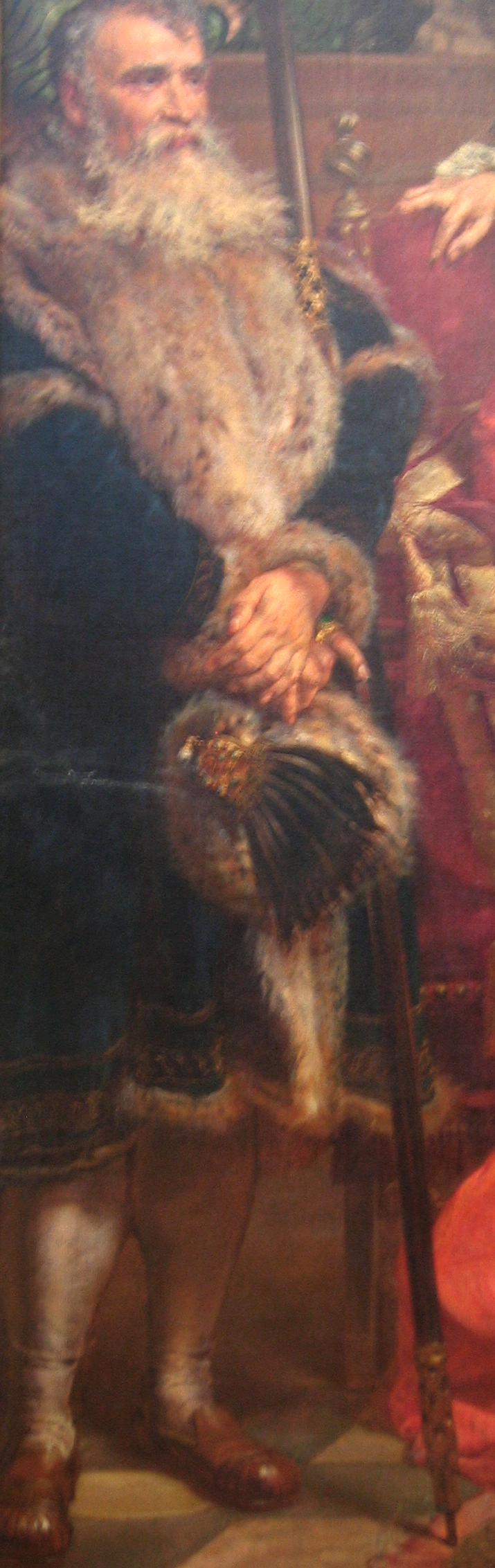 Jan Firlej, fragment of Unia Lubelska